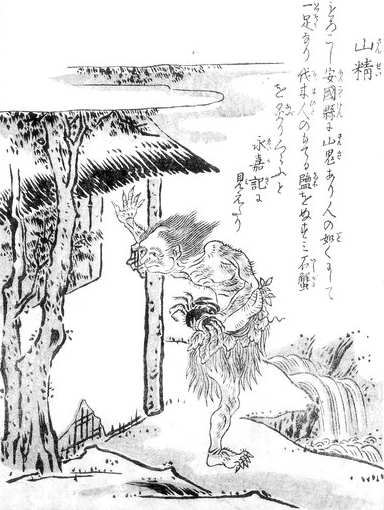 Sansei (山精) from the Konjaku Gazu Zoku Hyakki (今昔画図続百鬼)